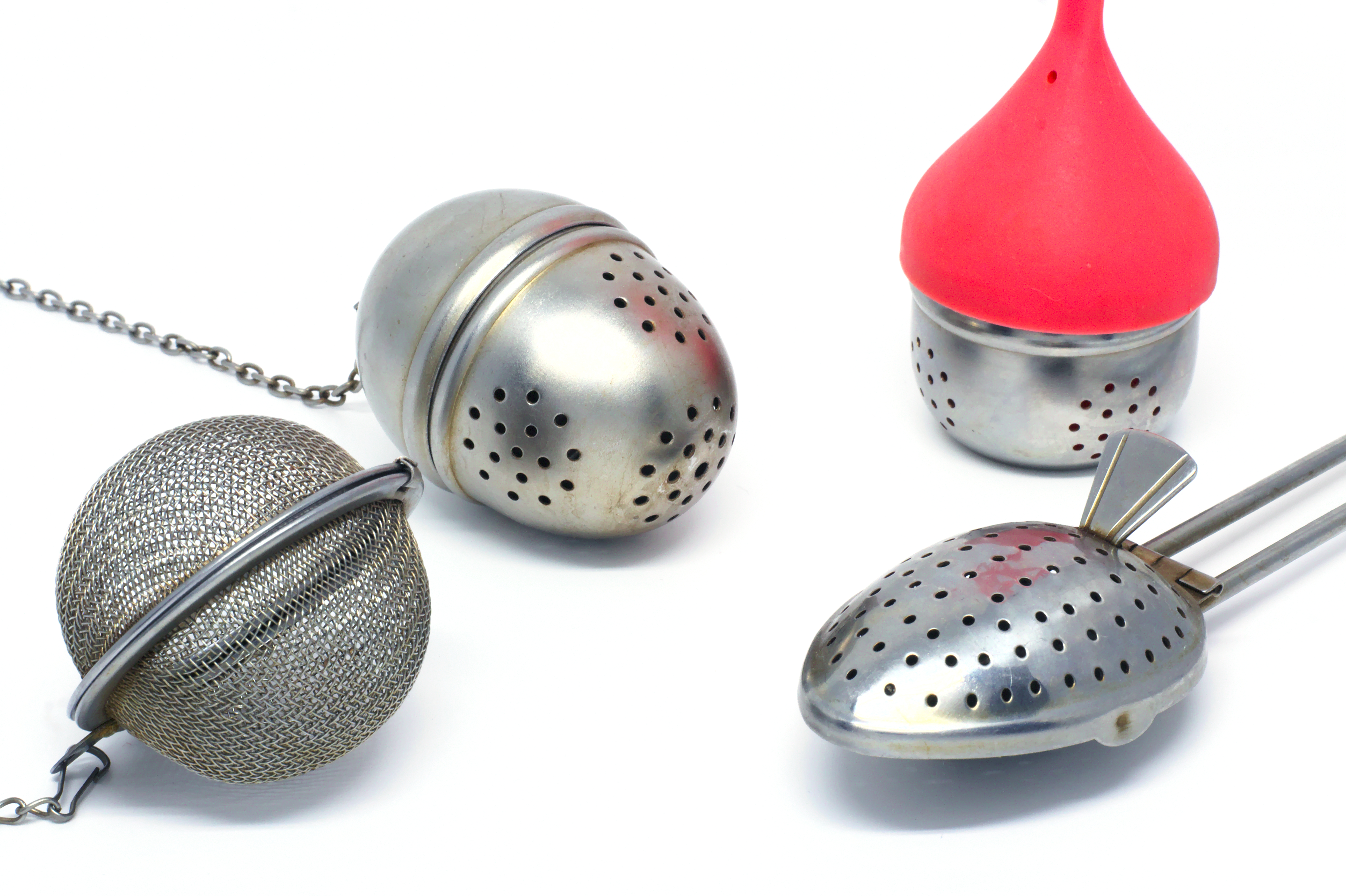 4 modèles différents de cuillers et boules à thé.